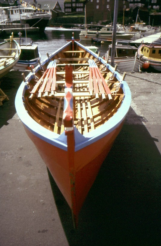 Typisches Ruderboot der Färöer in Tórshavn.